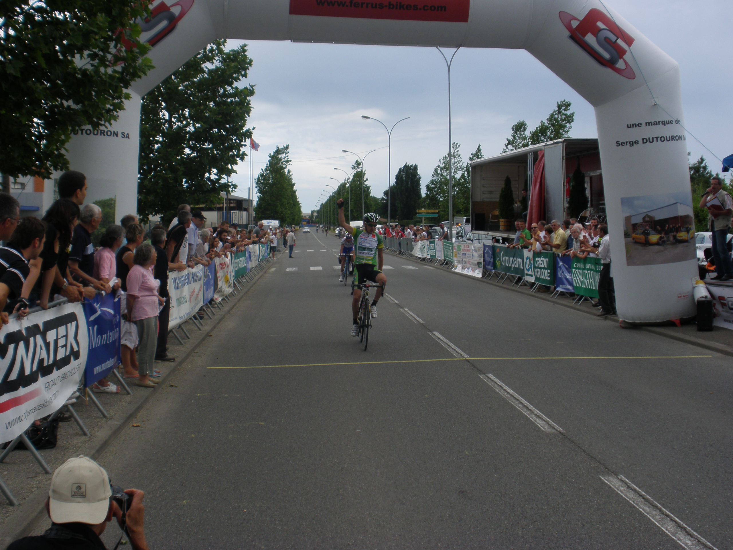 La victoire de Carl Naibo au Tour du Tarn-et-Garonne 2010.